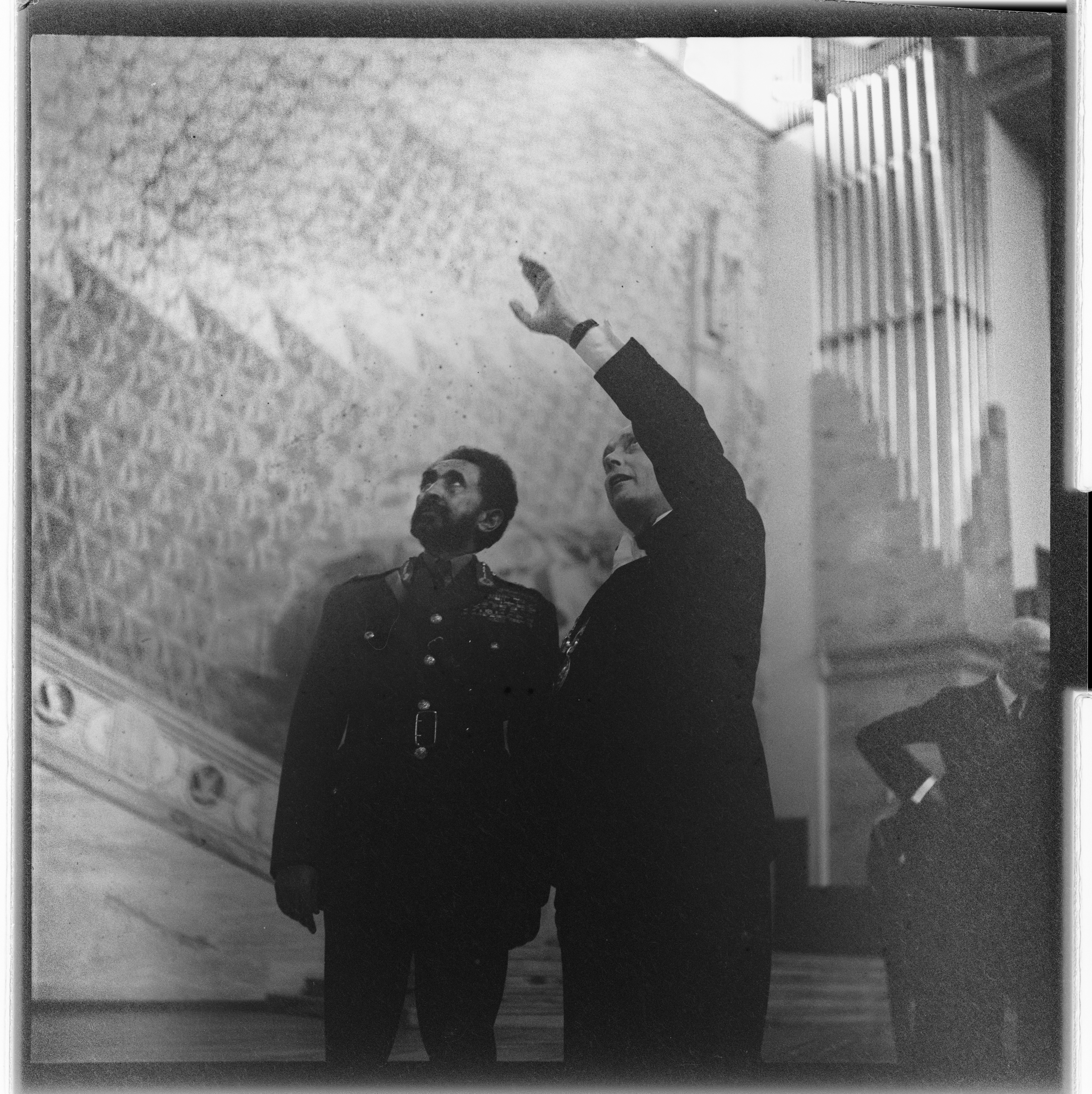 Bildet er hentet fra Arkivverket. Keiser Haile-Selassie. NÅ nr. 25, 1954 Arkivinstitusjon : Riksarkivet Arkivnavn : Billedbladet NÅ Sted : Norge, Oslo, Oslo, Oslo Rådhus Emneord: Arkitektur, Menn Avbildet: Keiser Haile-Selassie